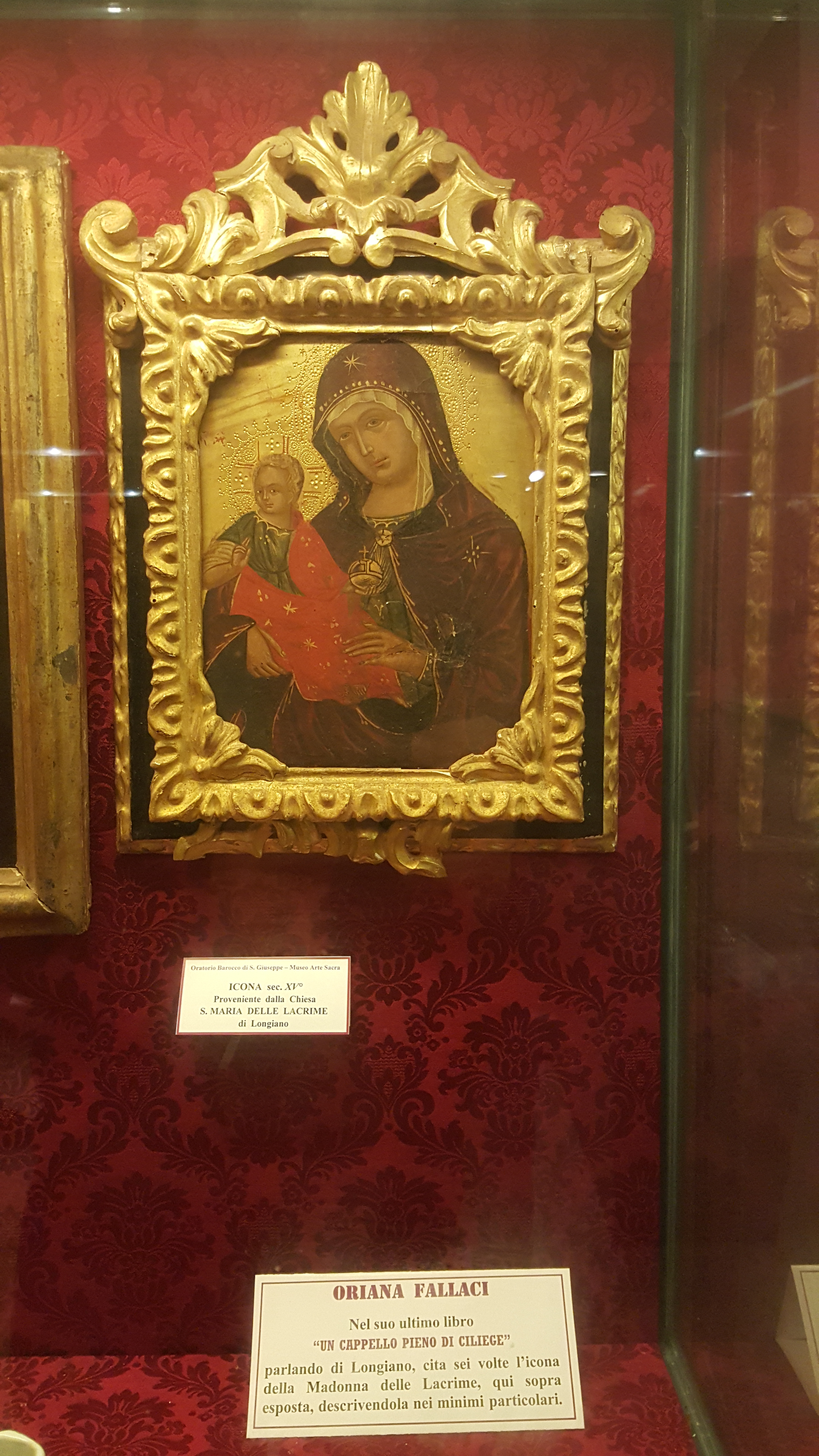 Museo d'Arte Sacra This is a photo of a monument which is part of cultural heritage of Italy.